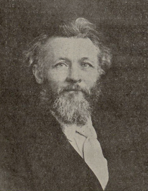 Ernst Skarstedt (1857-1929)